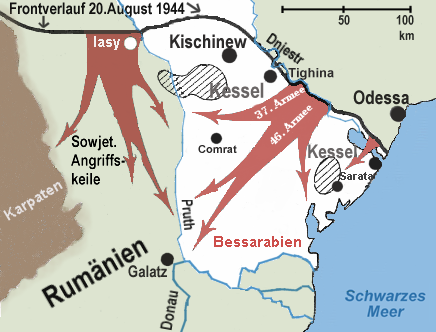 Karte der Operation Jassy-Kischinew.